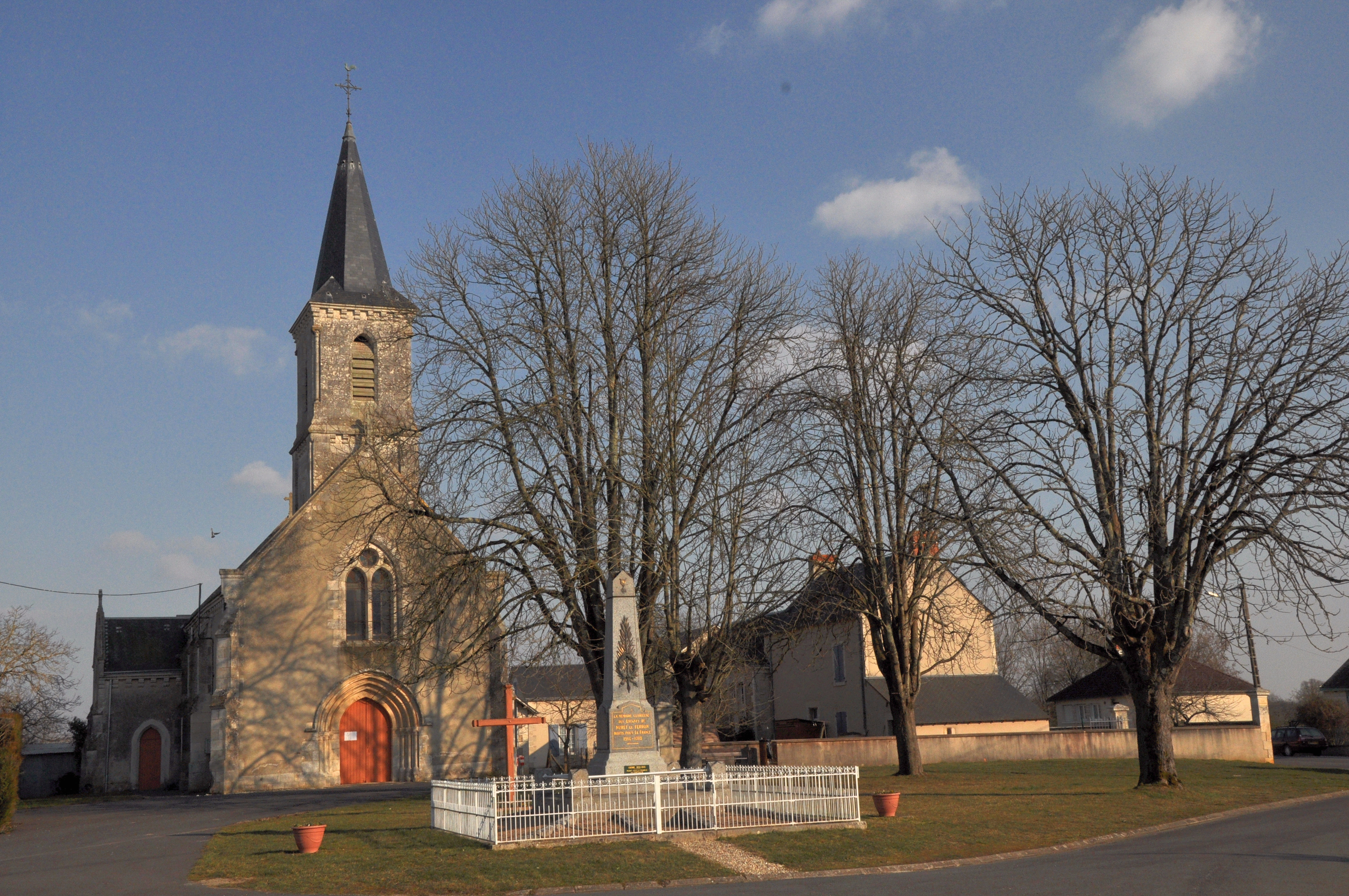 Nuret-le-Ferron (Indre) - Place de l'église